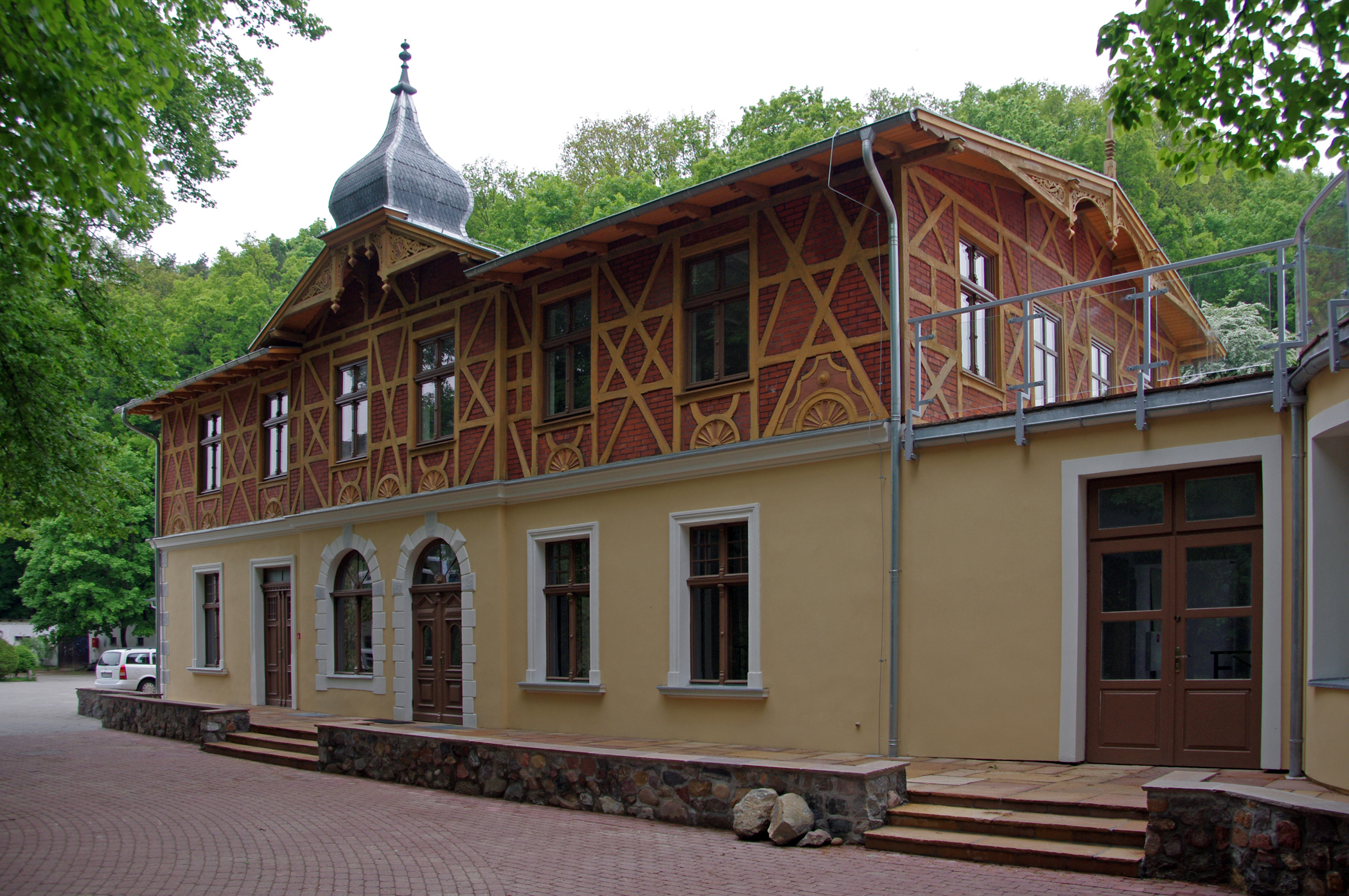 Zajazd (karczma) Adlera - Państwowe Liceum Sztuk Plastycznych